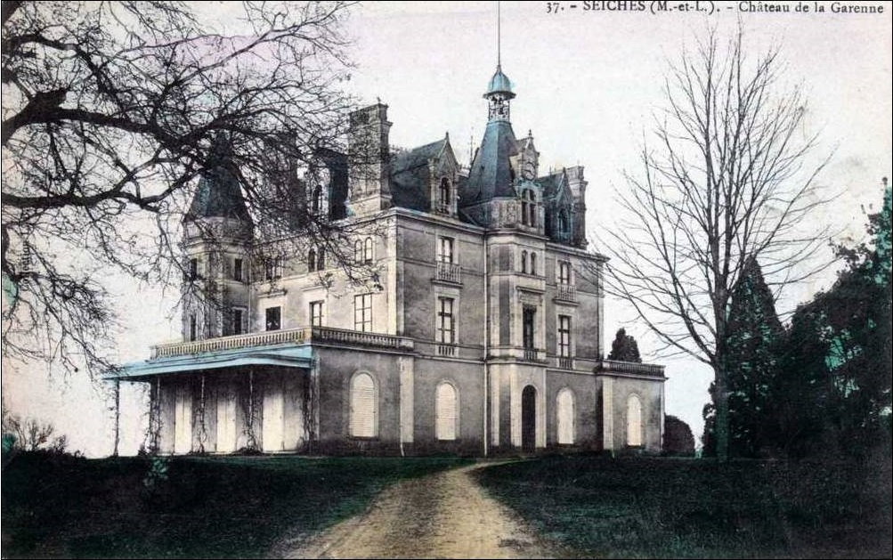 Carte postale colorisée, 37. Seiches-sur-le-Loir , Château de la Garenne